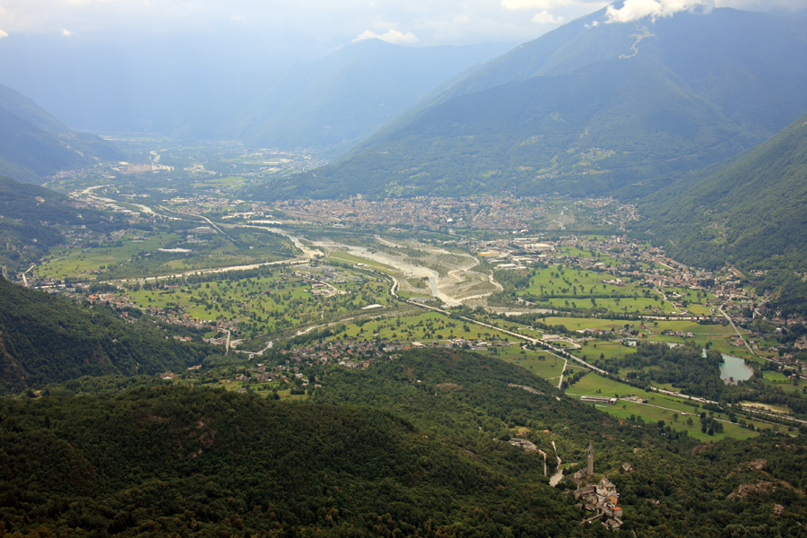 Panorama della Val d'Ossola